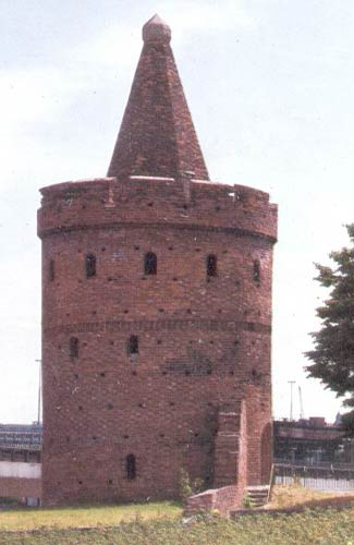 Virgin Tower in Szczecin in 2000